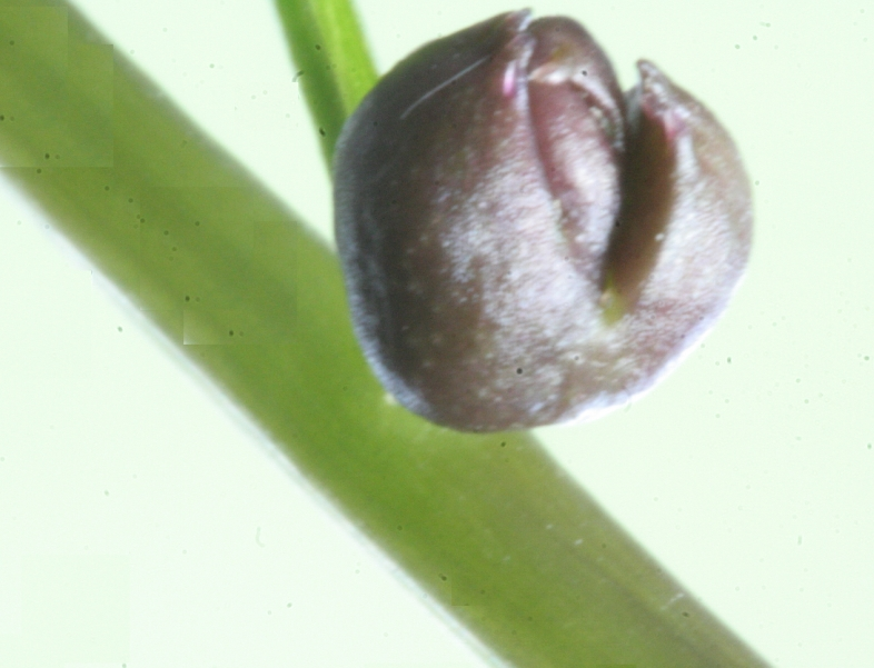 Cardamine_bulbifera (Dentaria Minore) Località : Melere, Trichiana (BL), 843 m s.l.m.